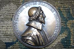 Médaille en bronze du XVIIème siècle représentant Pierre SEGUIER par Jean WARIN et frappée en 1633 à l'occasion de son accession aux fonctions de Garde des Sceaux. Paris collection particulière.